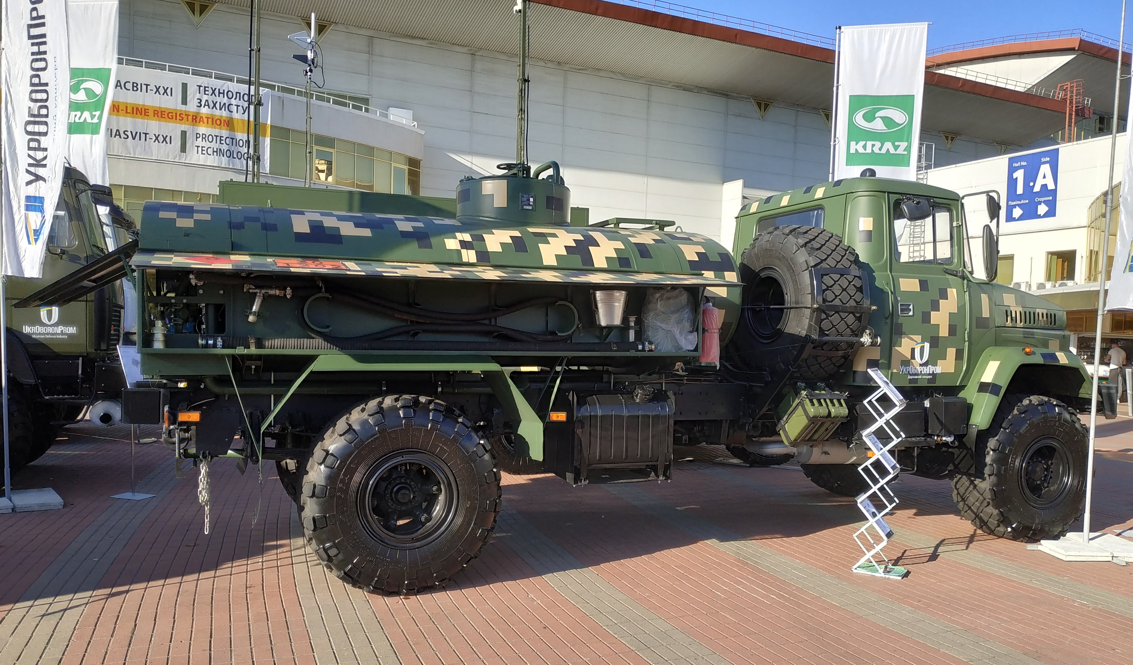 Автотопливозаправщик АПЗ-6,5-5233 в экспозиции 45-го экспериментального механического завода. Выставка "Зброя та безпека", Киев, октябрь 2018 г.